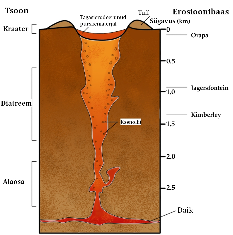 Vulkaanilõõr